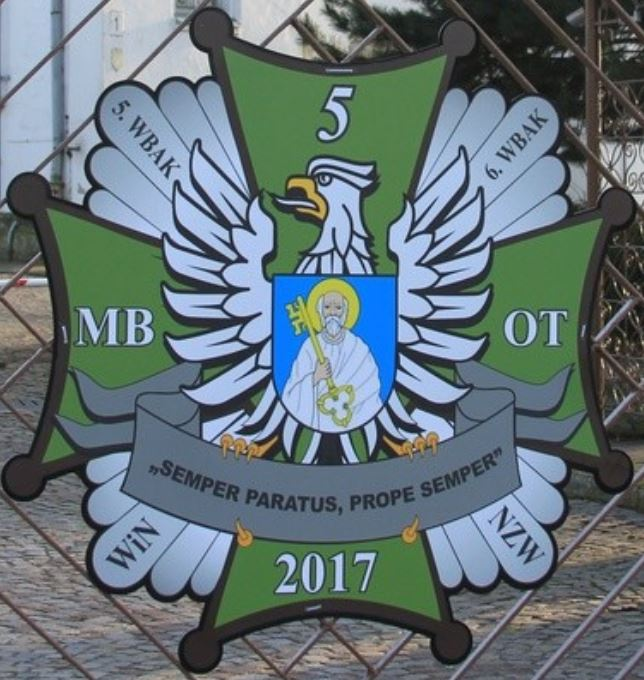 Odznaka 5 Mazowieckiej Brygady Obrony Terytorialnej